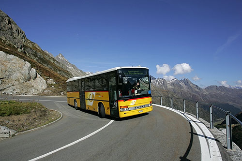 Postauto (Sustenpass - Urnerseite)